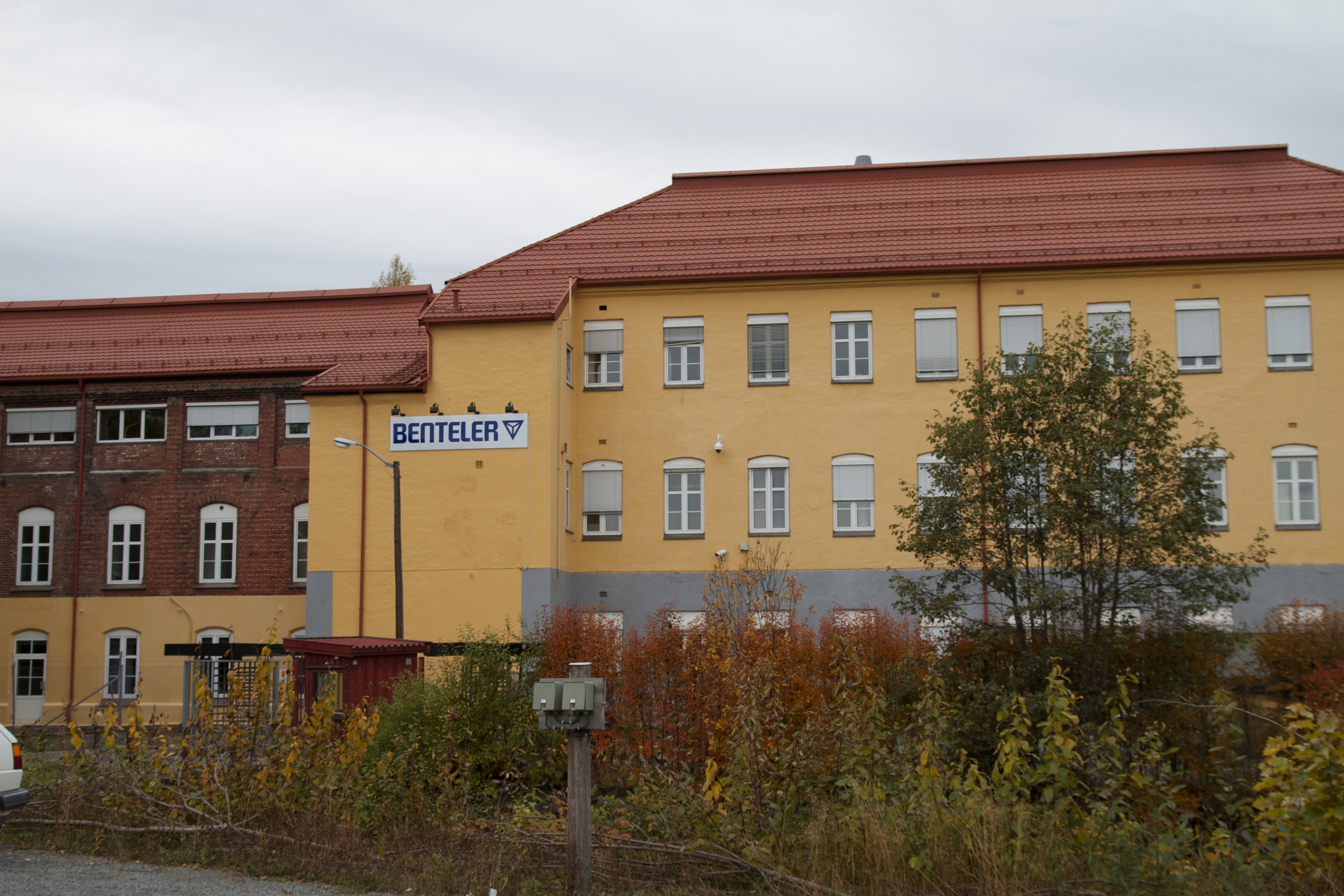 Raufoss Fyrstikk- og Patronfabrikk. Bygget først som fyrstikkfabrikk, deretter nedbrent og gjenoppbygget som patronfabrikk.